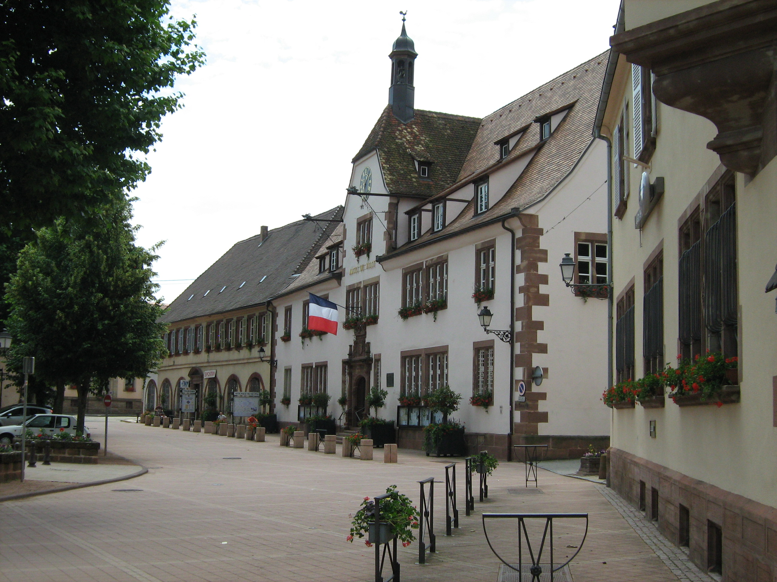 facade principale de la chancellerie à Bouxwiller (67) France.